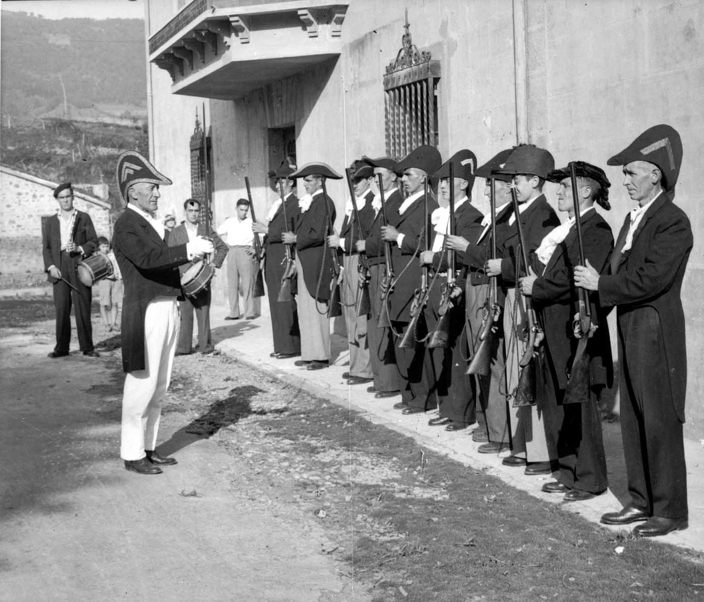 Errebonbilloen kapitaina aginduak ematen